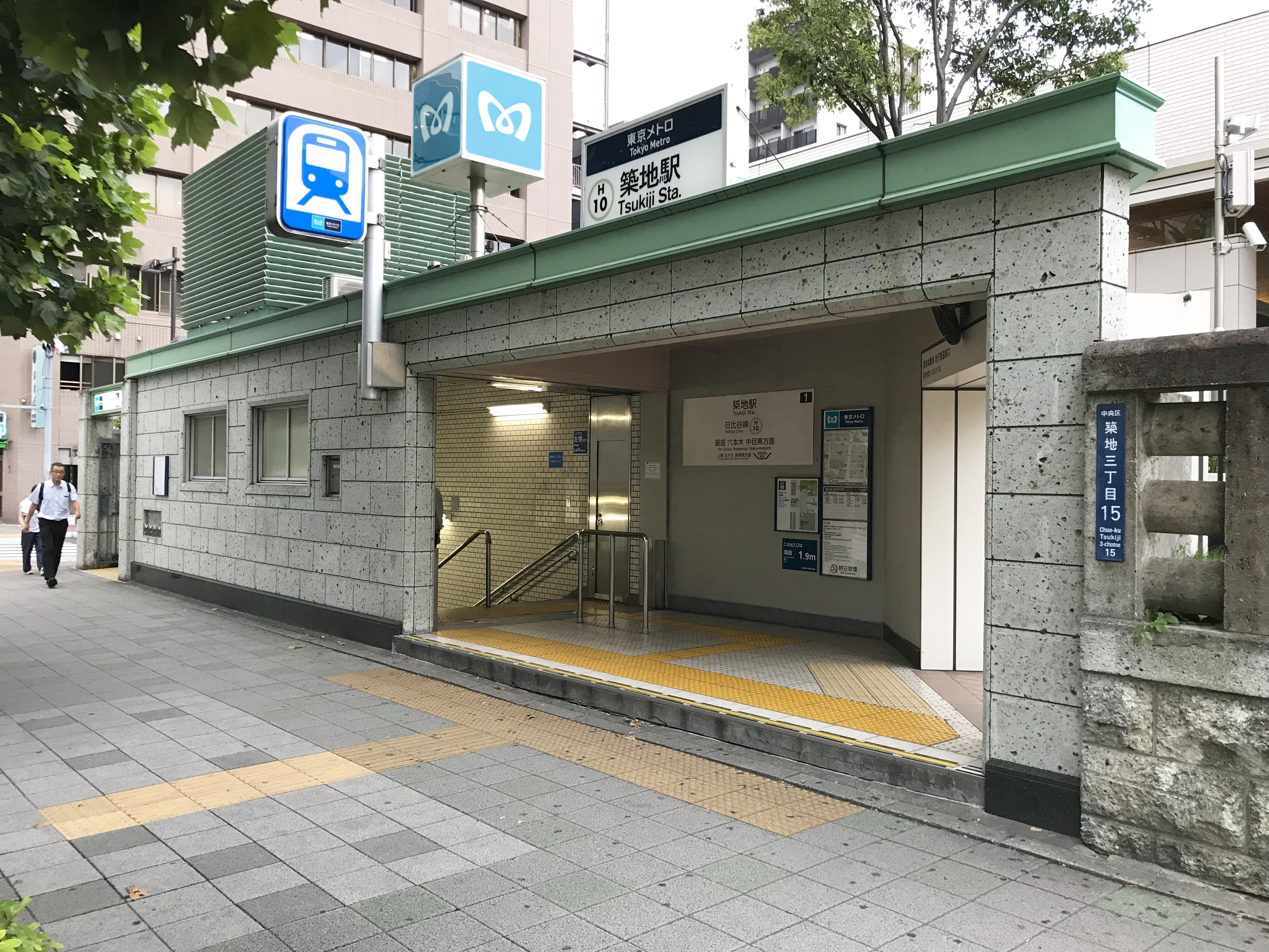 東京メトロ日比谷線築地駅1番出入口